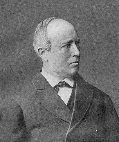 Heinrich Brunn (1820–1885), deutscher klassischer Philologe. Originalphotographie aus dem Besitz von Dr. Richard Meister, Leipzig